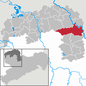 Belgern-Schildau in Saxony - Landkreis Nordsachsen